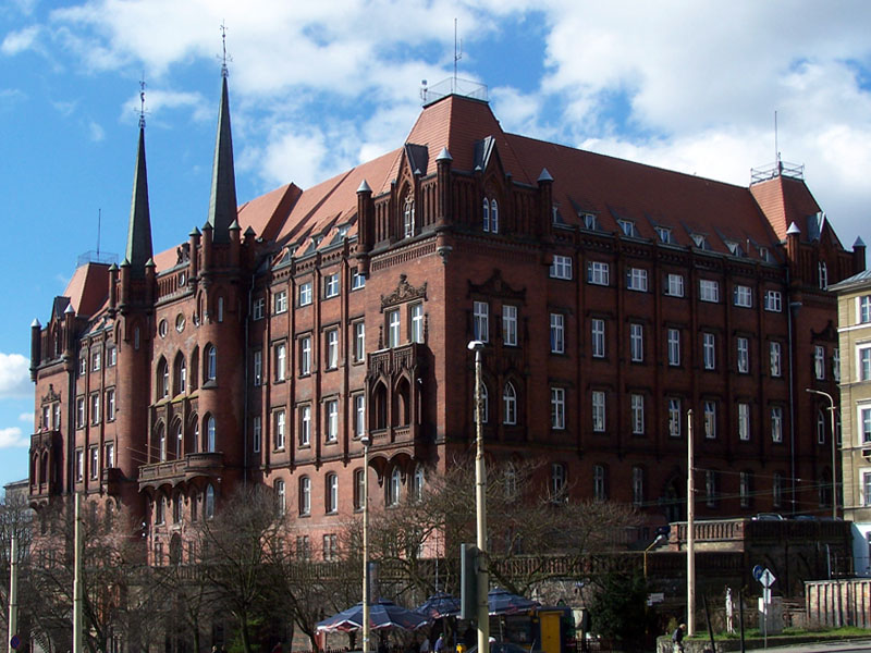 Czerwony Ratusz w Szczecinie